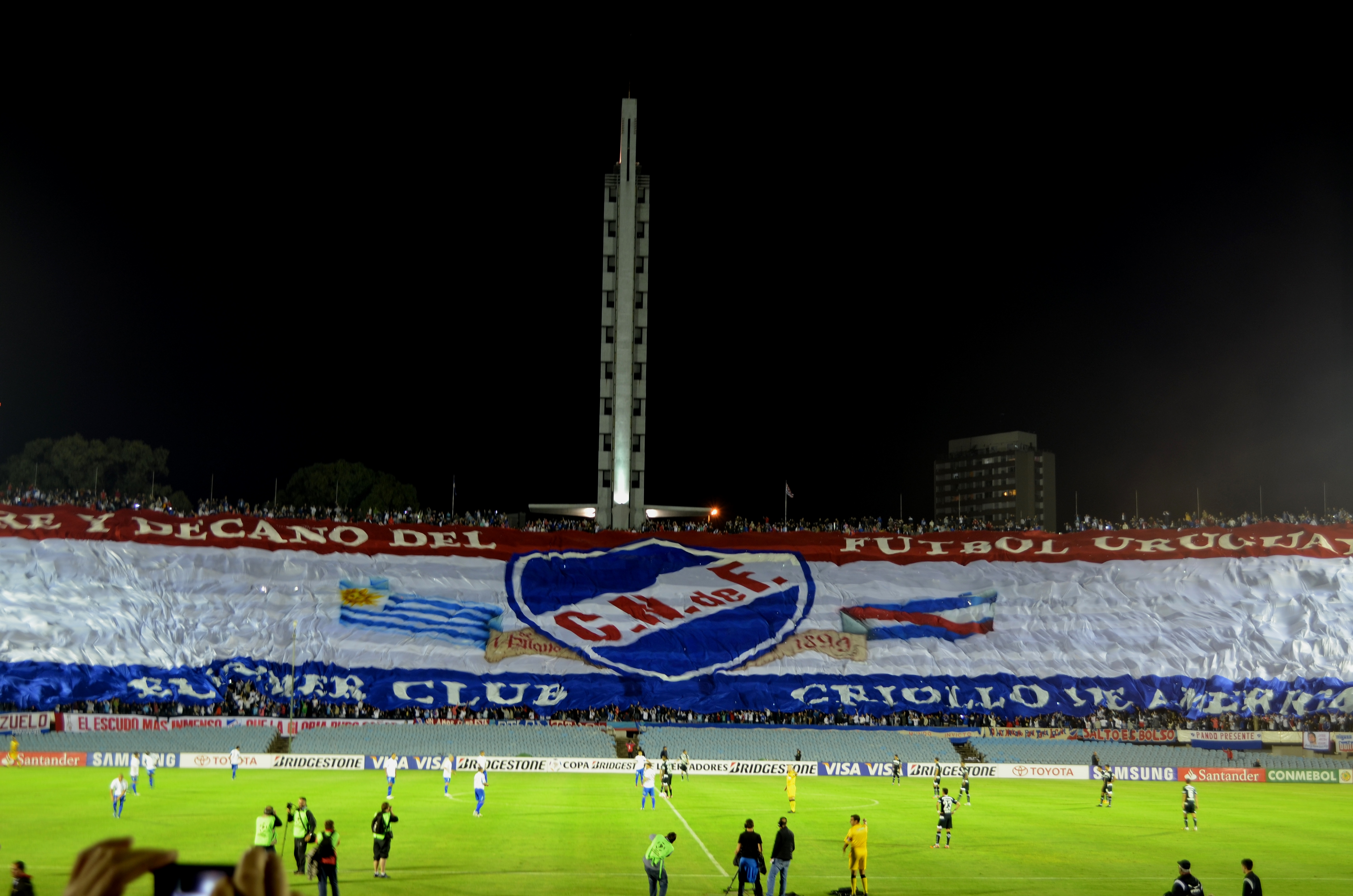 Imagen de la "Bandera más grande del Mundo", desde la Tribuna Olímpica